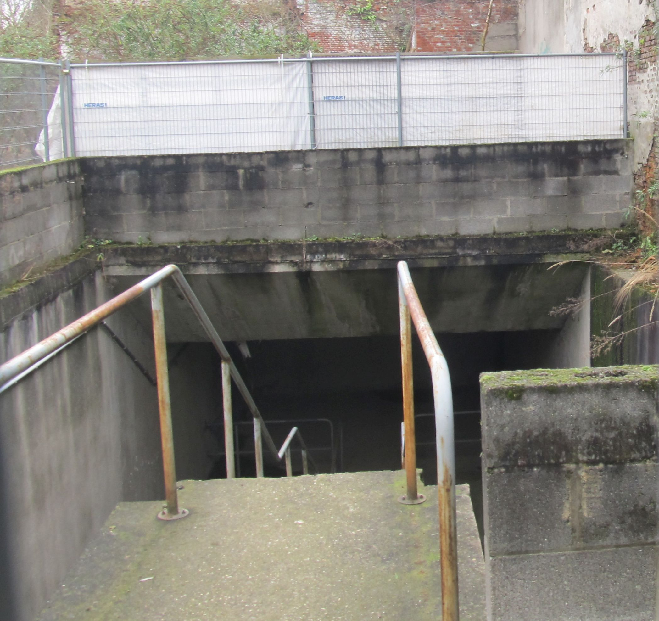 Gura de premetrou Sint-Willibrordus. Stația nu se află în funcțiune.